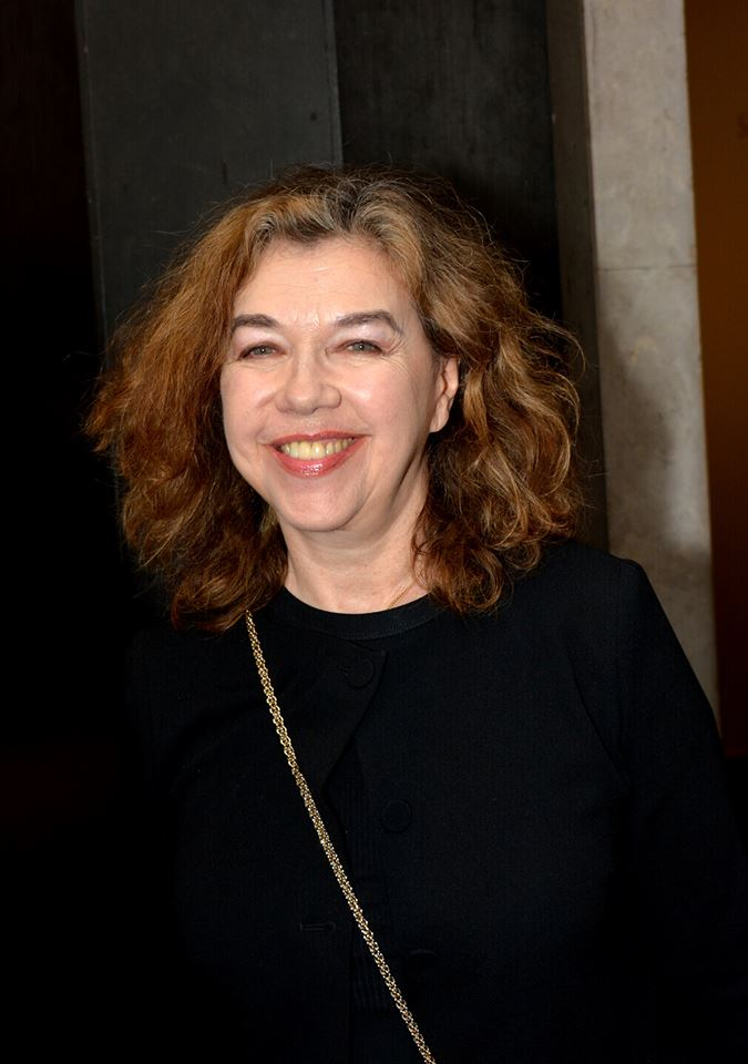 Sabine Haudepin à la cérémonie des Molières